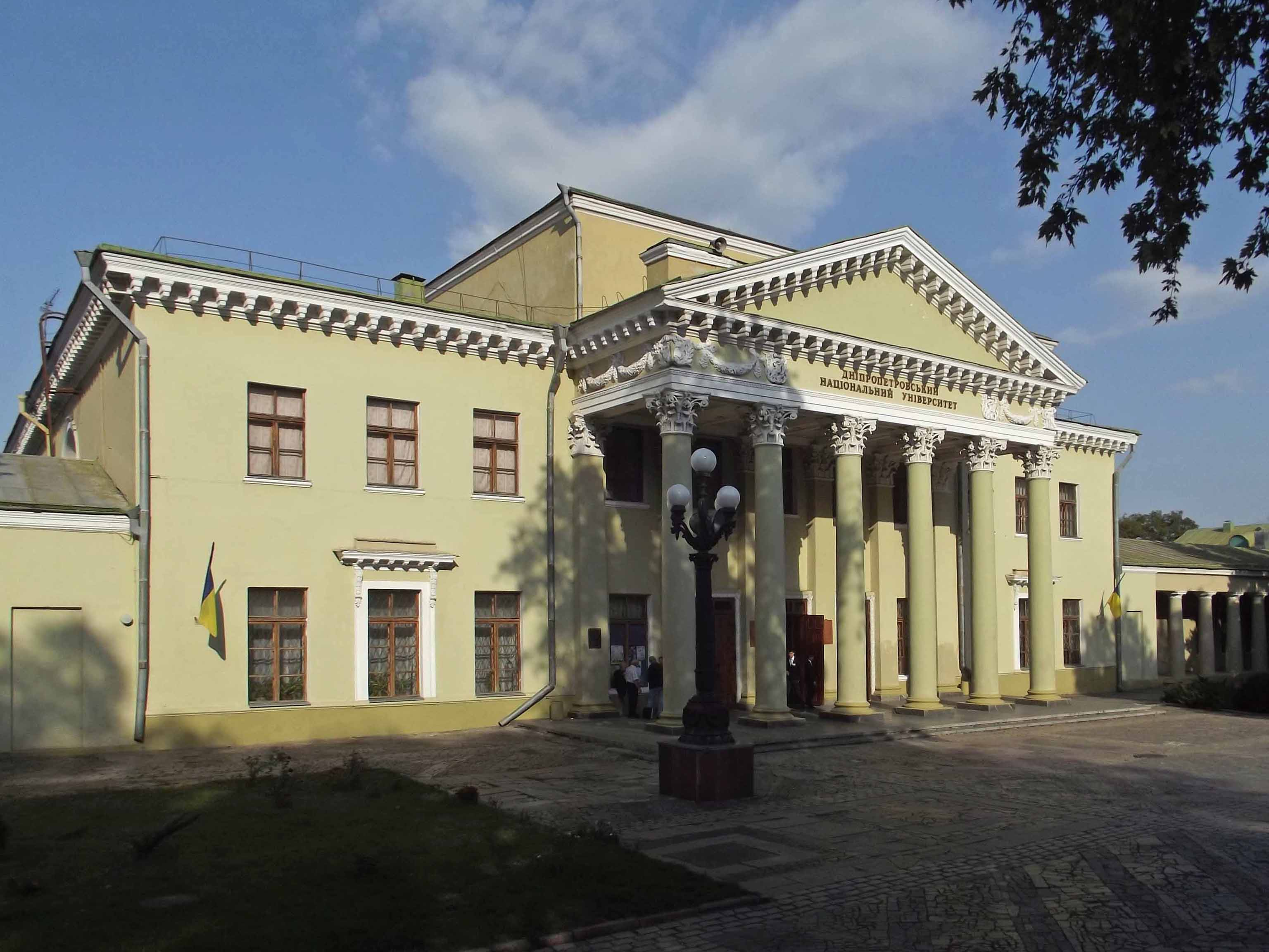 ДК студентов